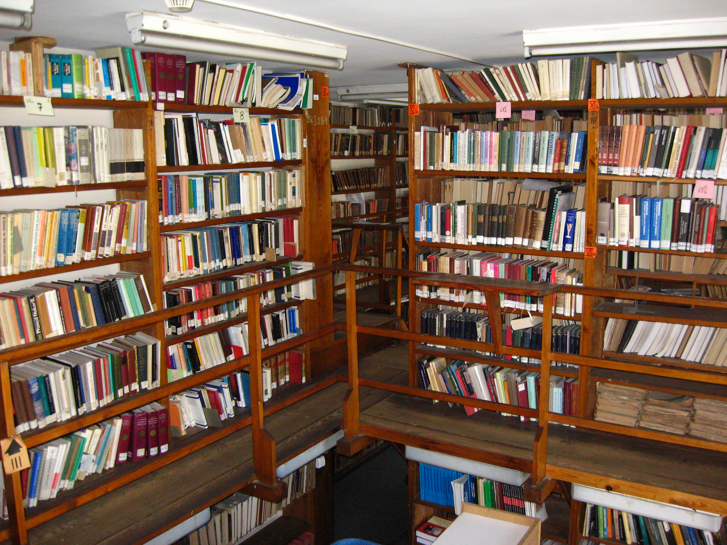 2016 r.